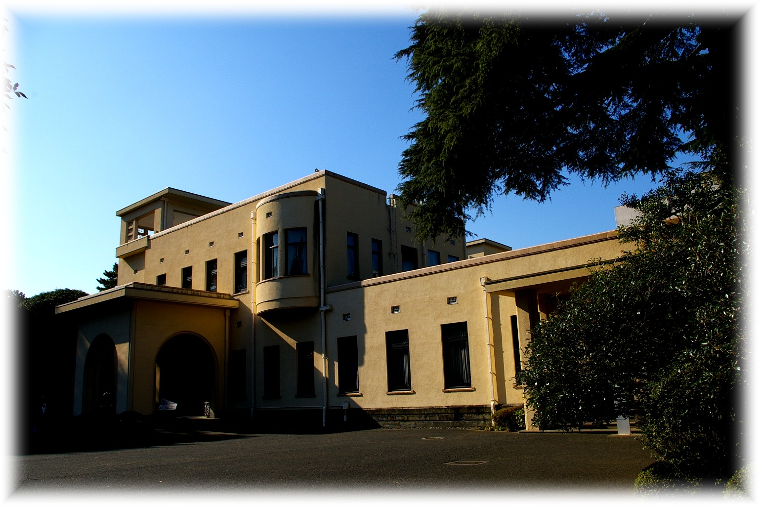 Ich machte dieses Foto von mir in 2006.